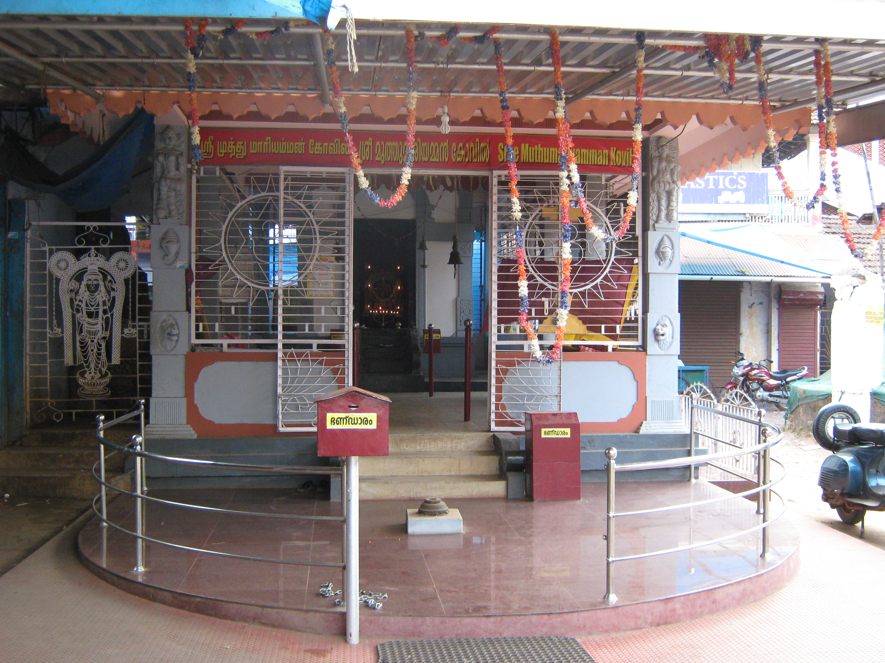 Kannur, Kerala, India.